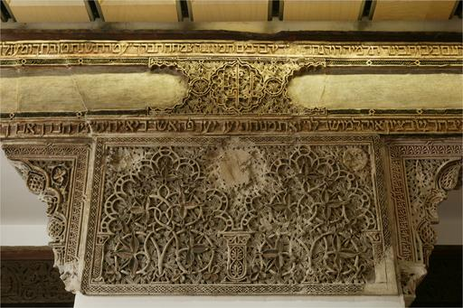 yeseria de la galeria de las mujeres.